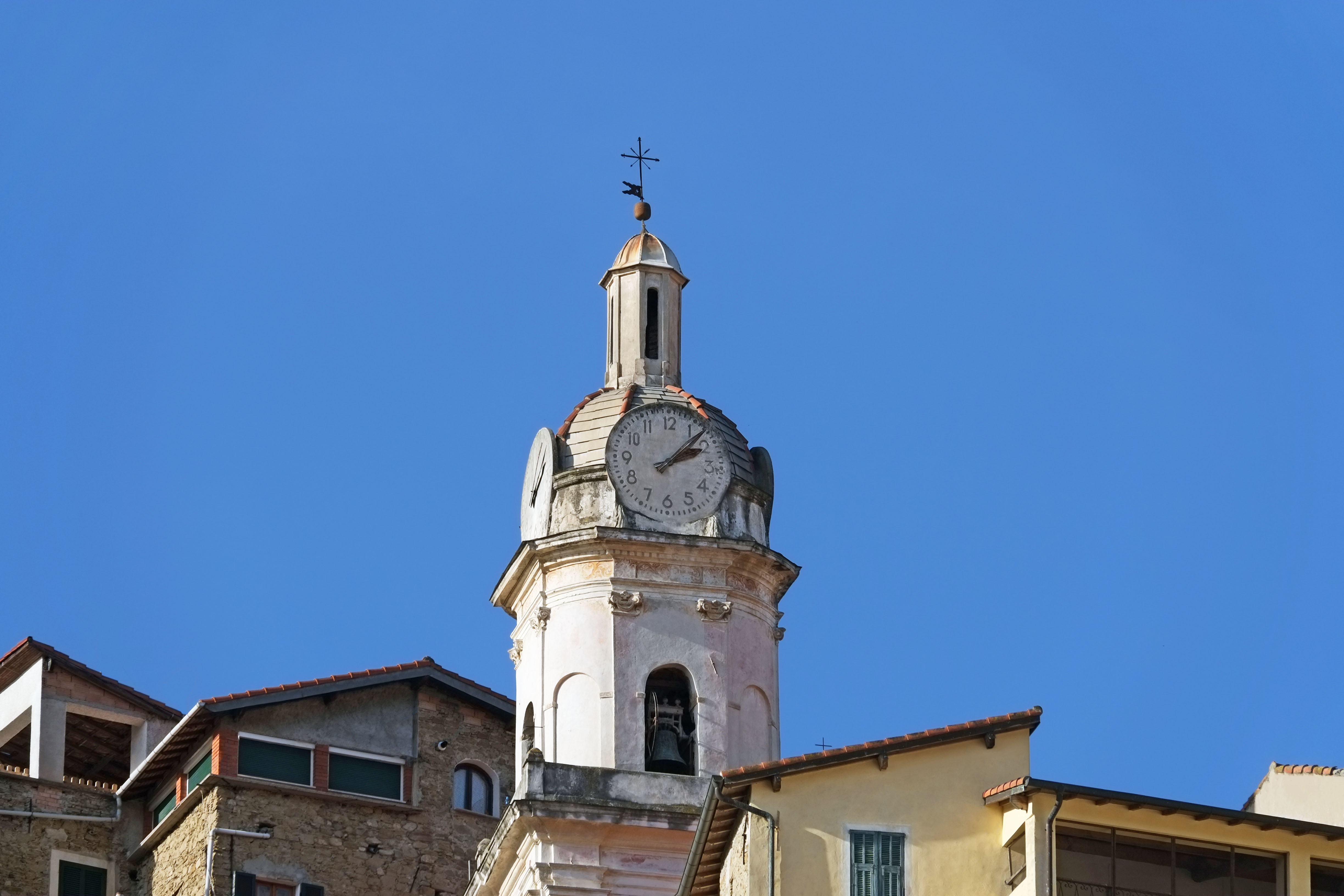 Clocher de la chiesa dei Santi Fabiano e Sebastiano de San Biagio della Cima.